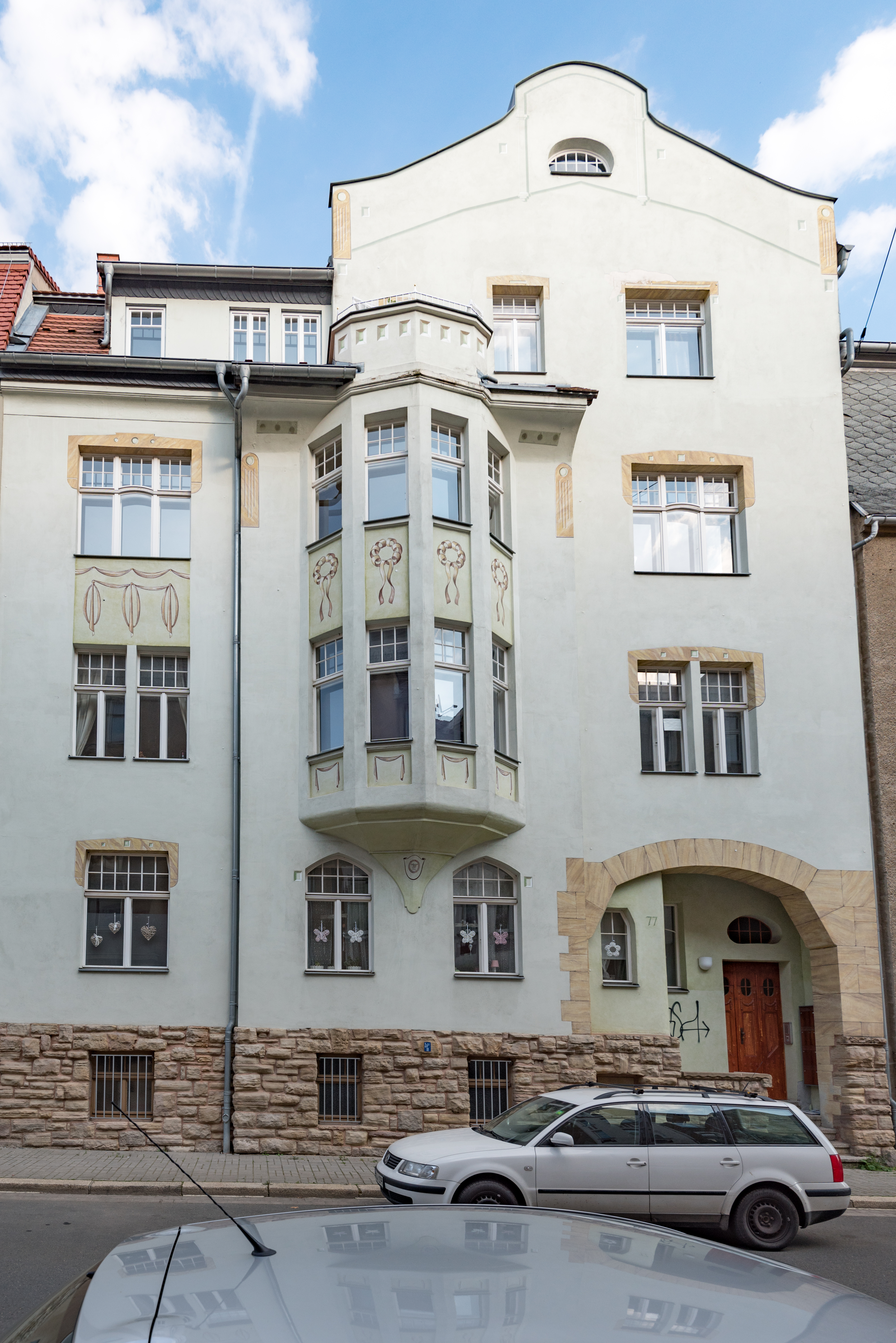 Zeitz, August-Bebel-Straße 77